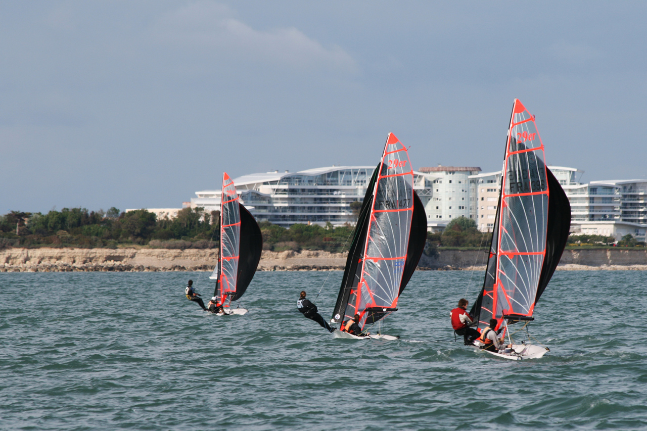 Deriveurs 29er dans la baie de La Rochelle